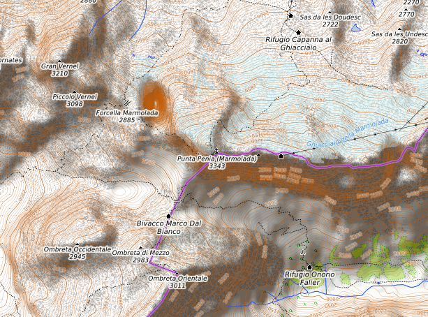 carte réalisée sur umap This map may be incomplete, and may contain errors. Don't rely solely on it for navigation.